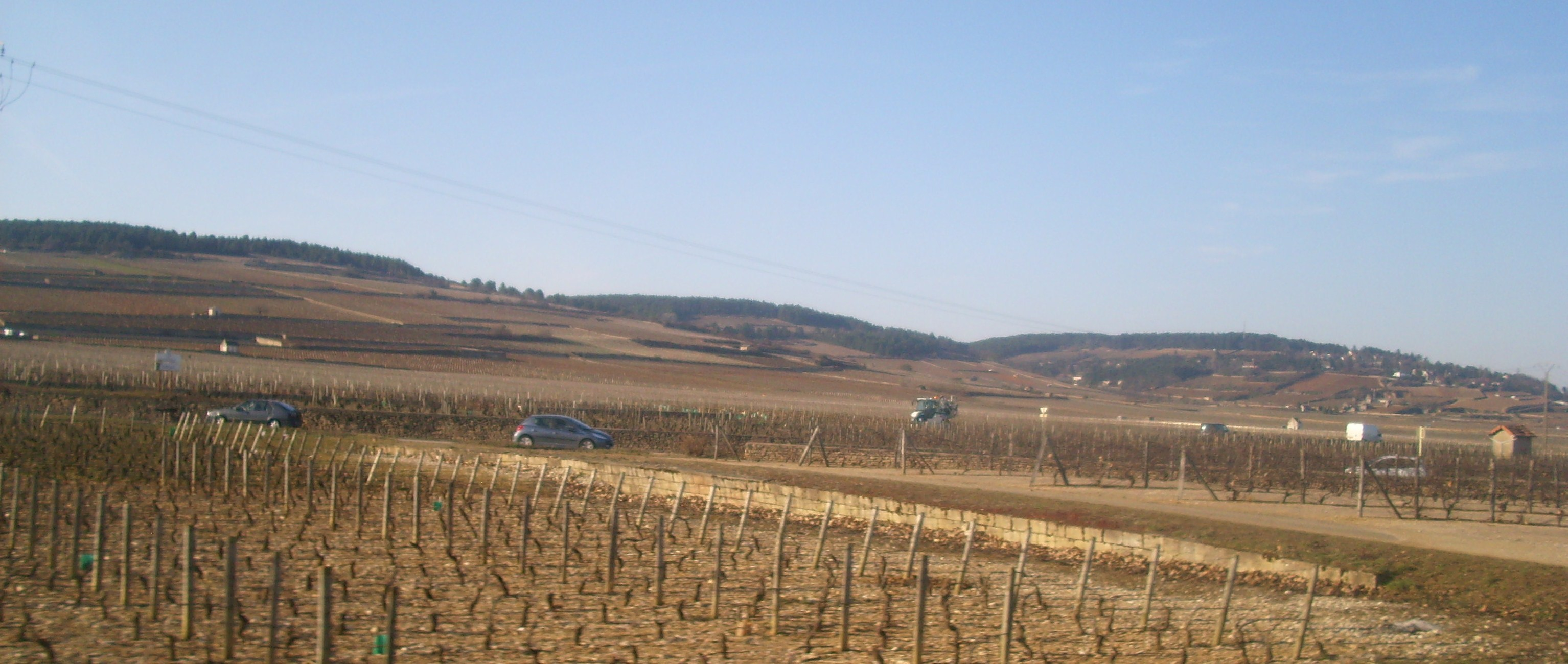 Vue d'une partie du vignoble de Beaune